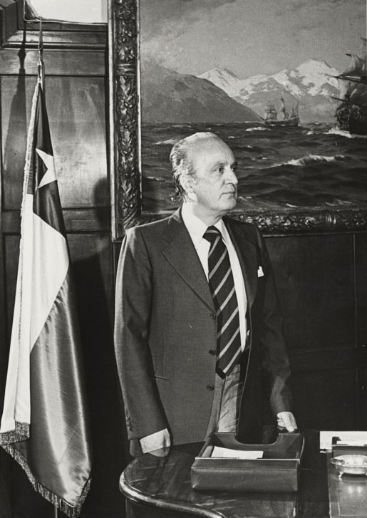 René Rojas Galdames, Ministro de Relaciones Exteriores de Chile entre 1980 y 1983.